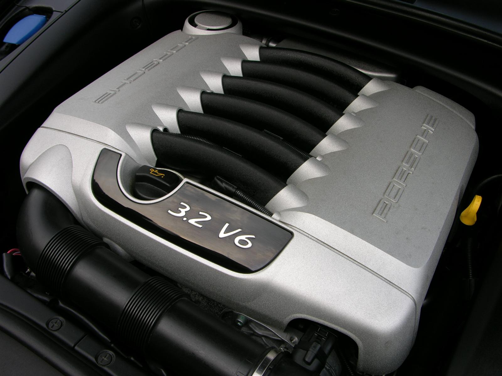 Porsche Cayenne 3.2 V6